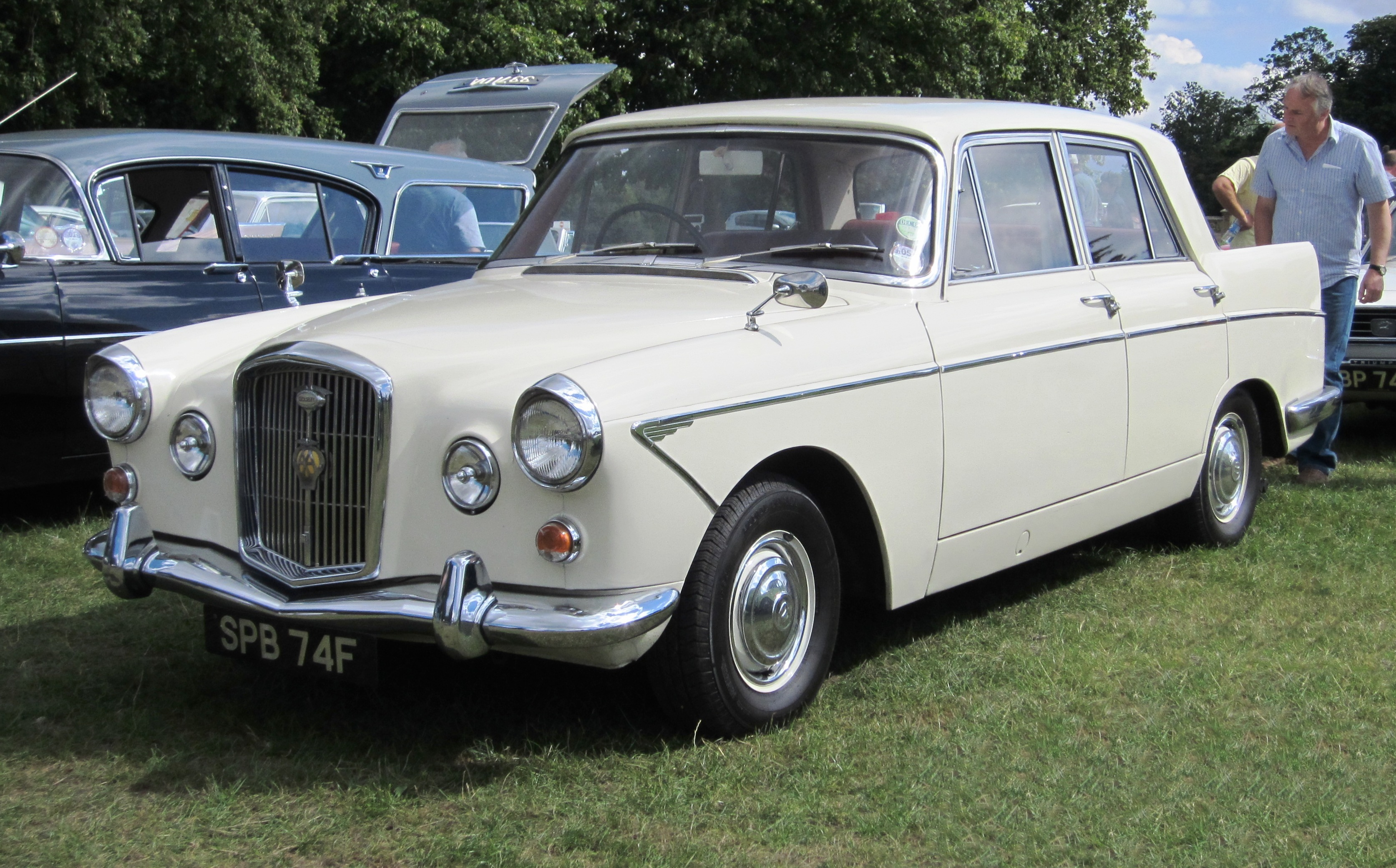 Wolseley 6/110 (1967)